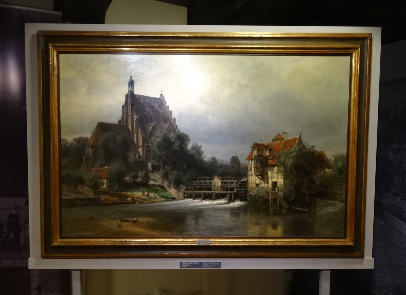 Wystawy Muzeum Okręgowego im. Leona Wyczółkowskiego w Bydgoszczy w spichrzach przy ul. Grodzkiej - Noc Muzeów 2014